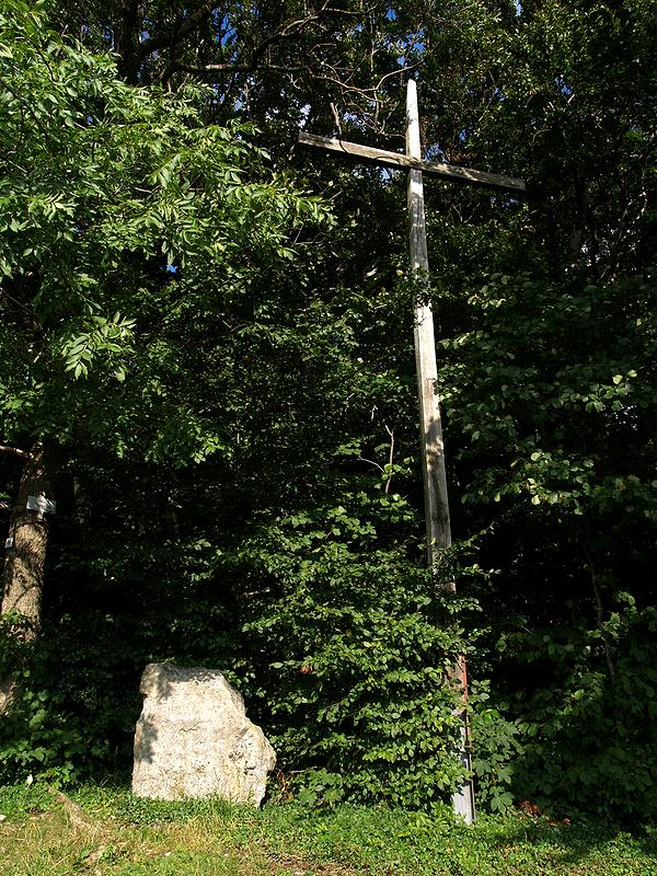 Boßlerkreuz und Gedenkstein für die Opfer der Flugzeugunglücke am Boßler